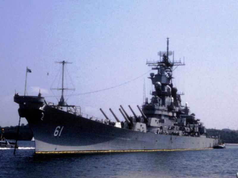 IOWA